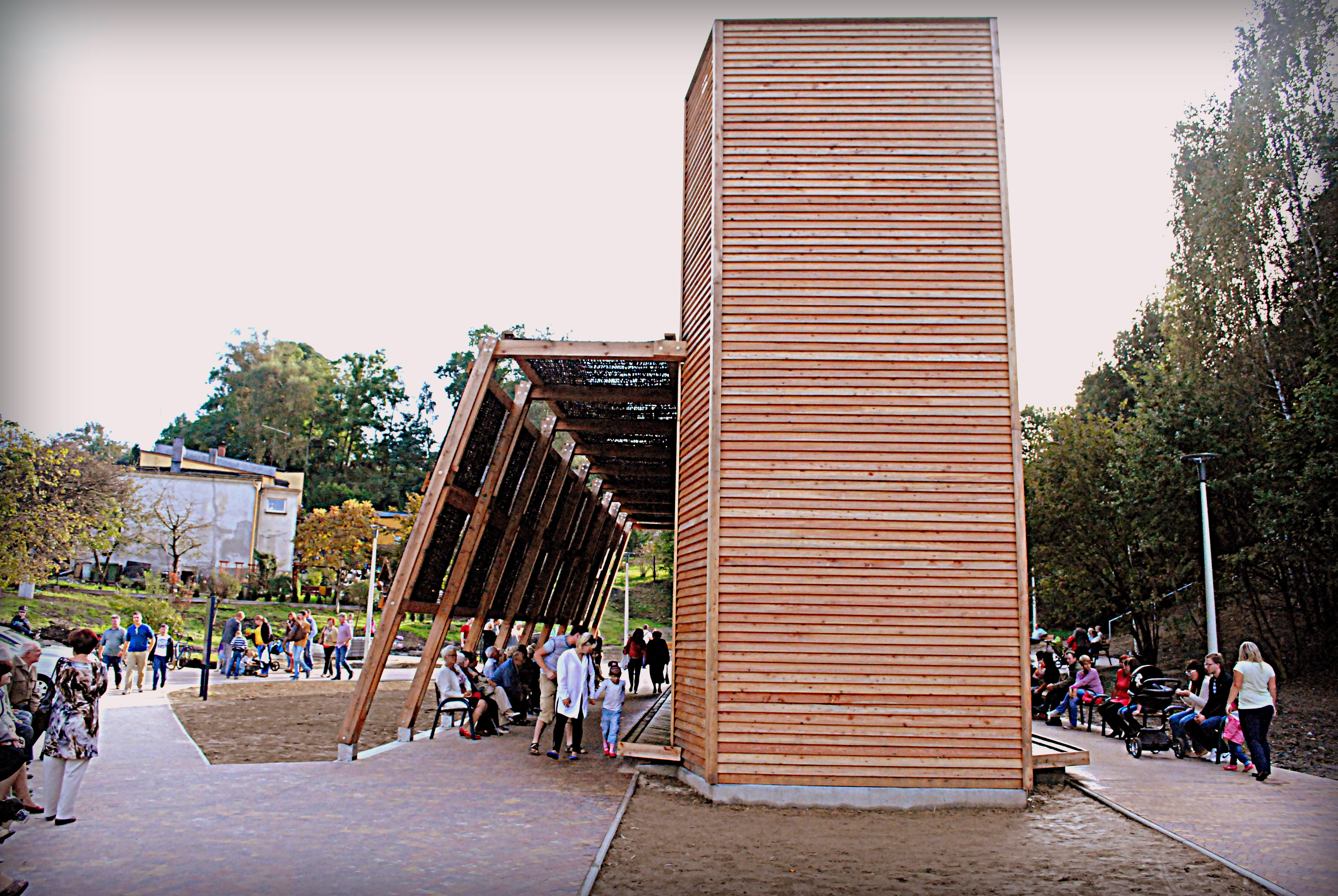 Tężnia solankowa w Radlinie (pow. wodzisławski, woj. śląskie)